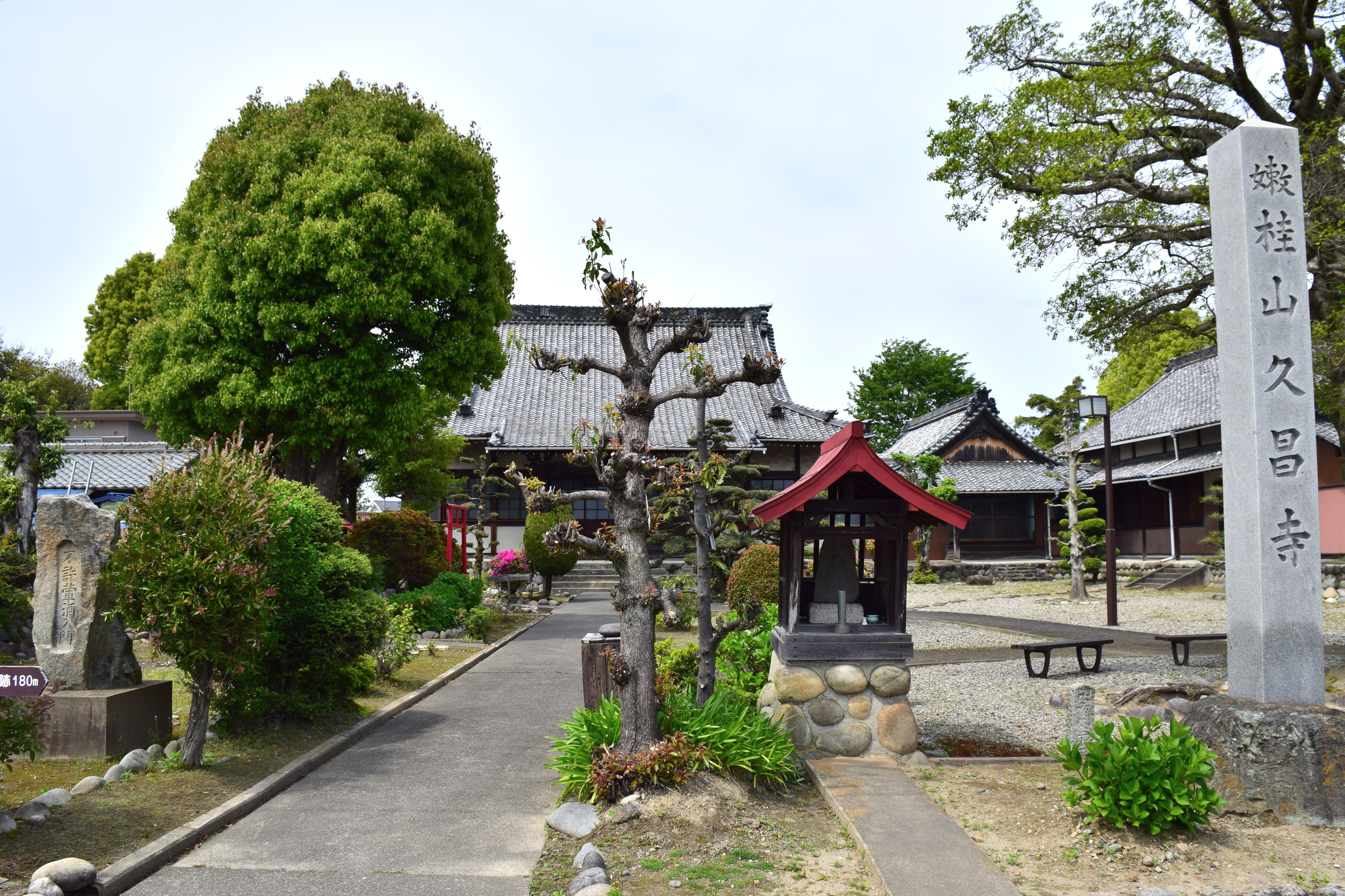 久昌寺（生駒氏の菩提寺）